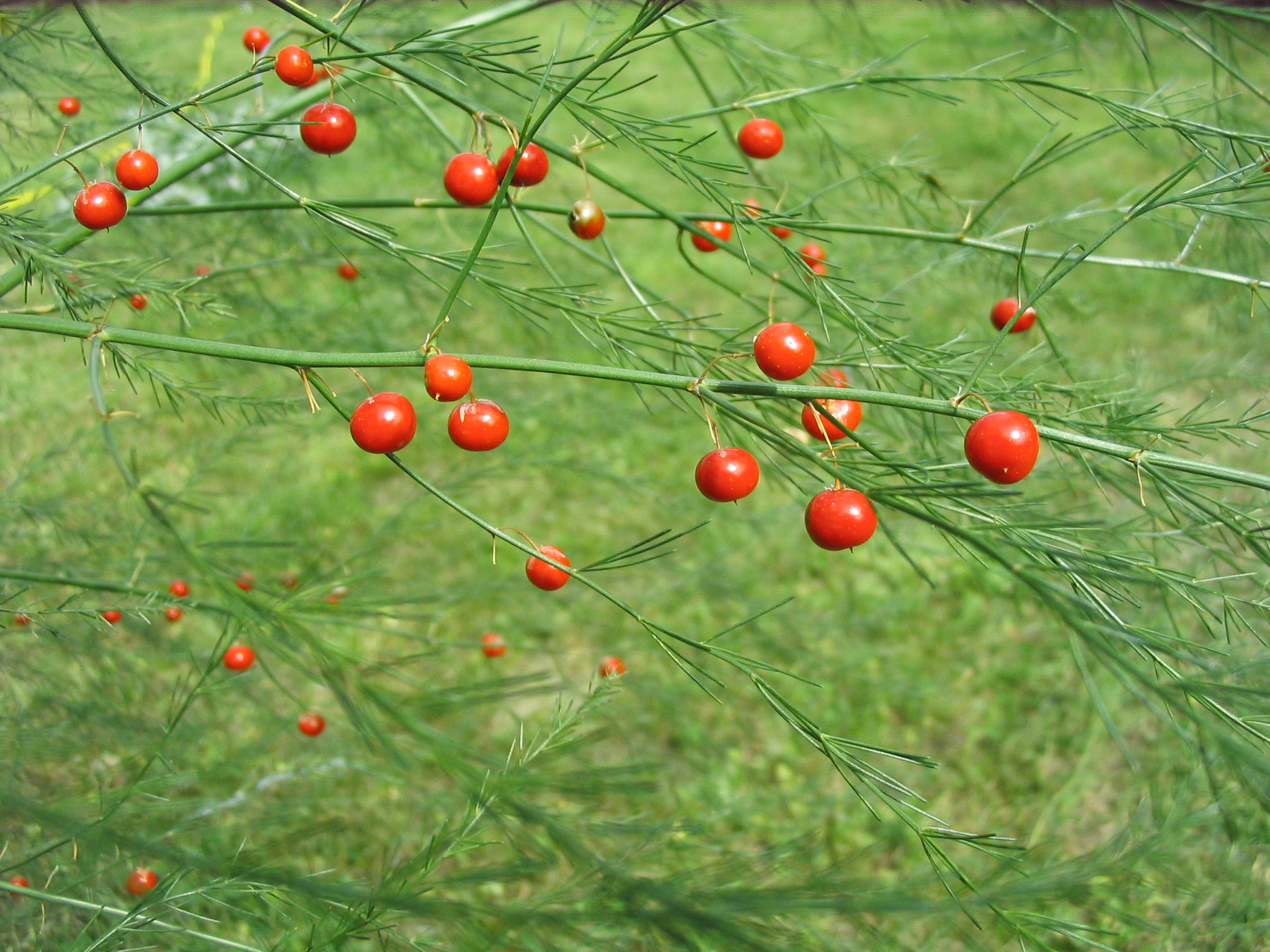 Früchte von Gemüsespargel, Asparagus officinalis